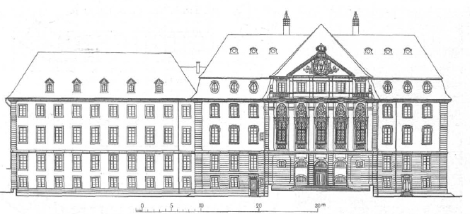 Land- und Amtsgericht Hanau, Hauptansicht an der Nußallee